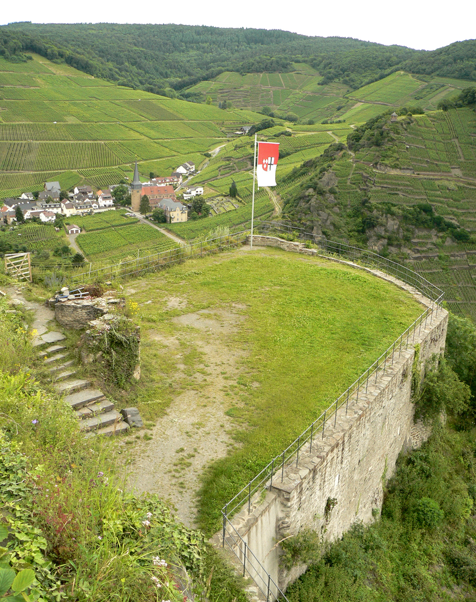 Saffenburg